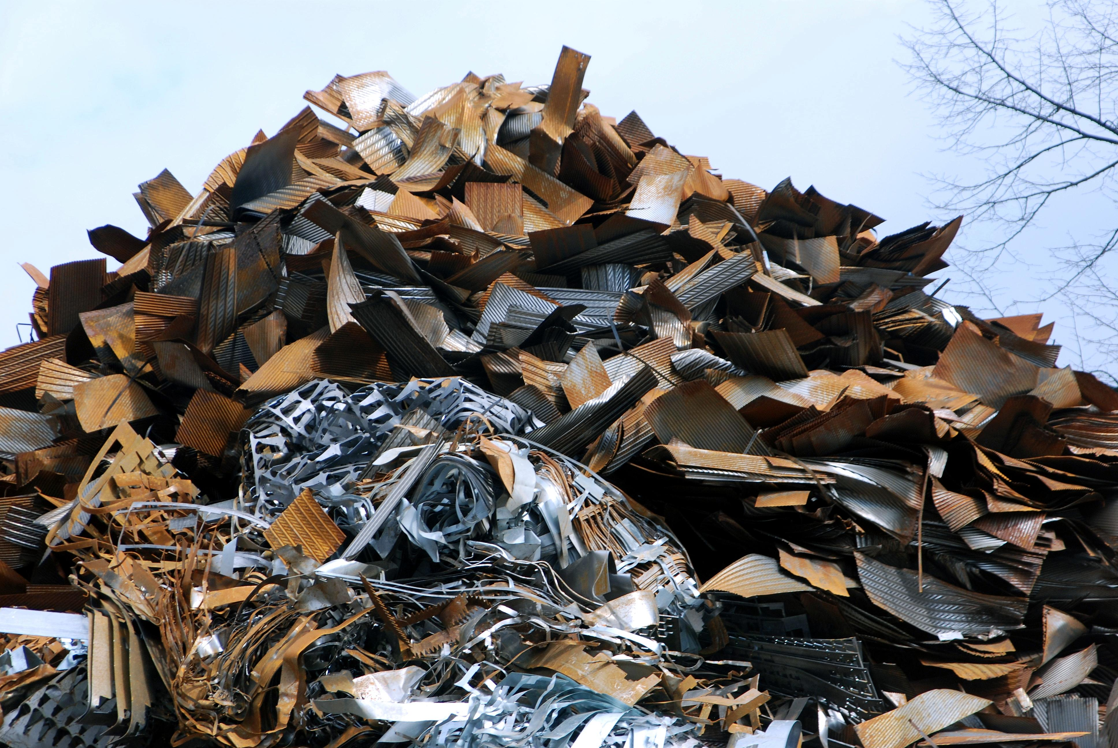 Ein Schrotthaufen in Berlin.